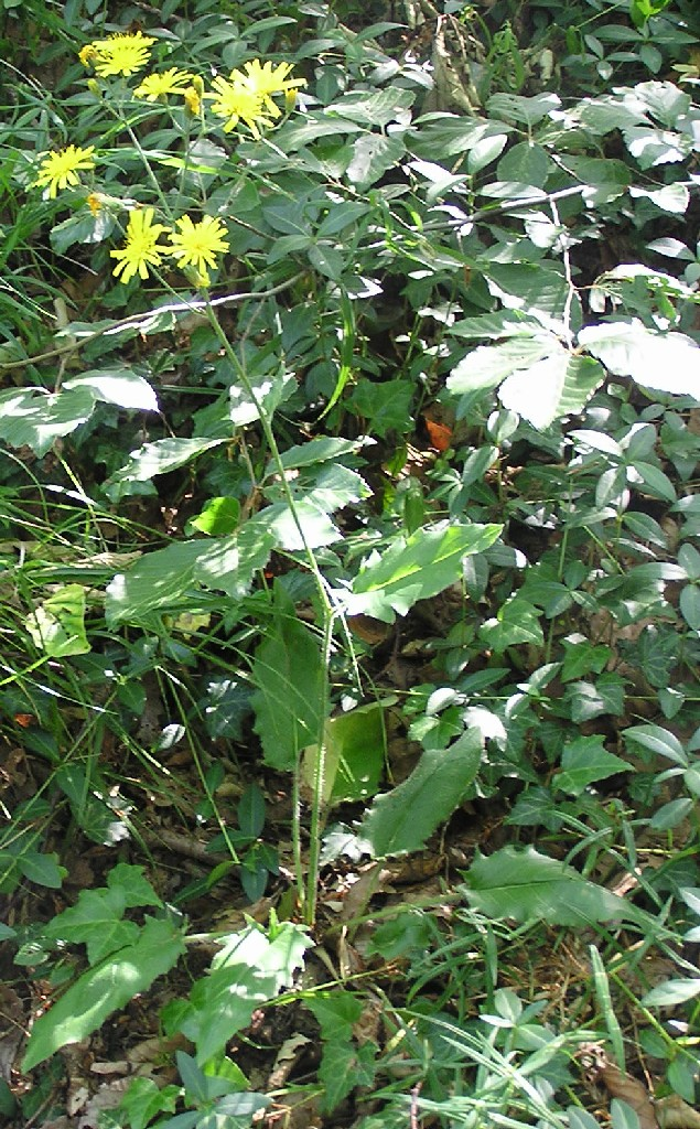 Hieracium murorum im Ahrtal.